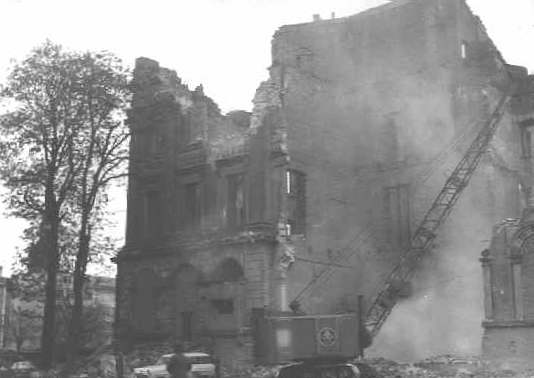 Abbrucharbeiten am Braunschweiger Schloss 1960